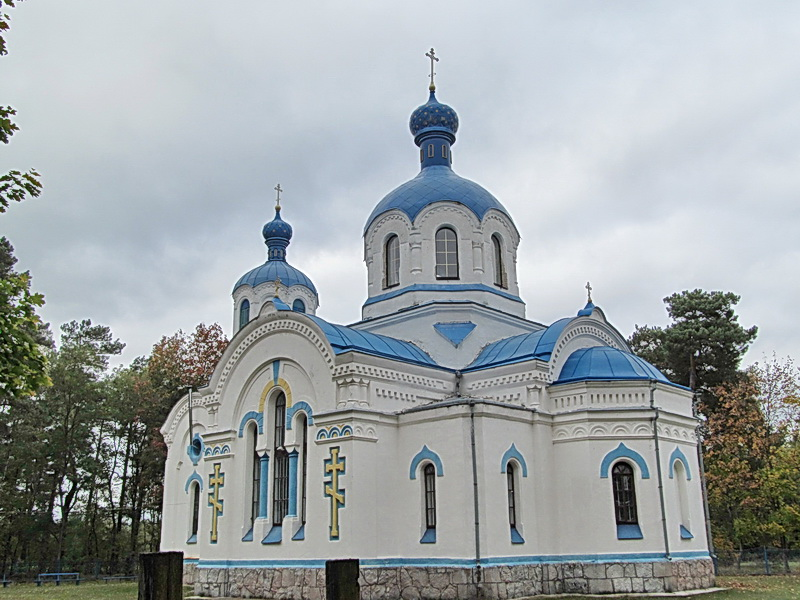 Чыжэўшчына. Царква